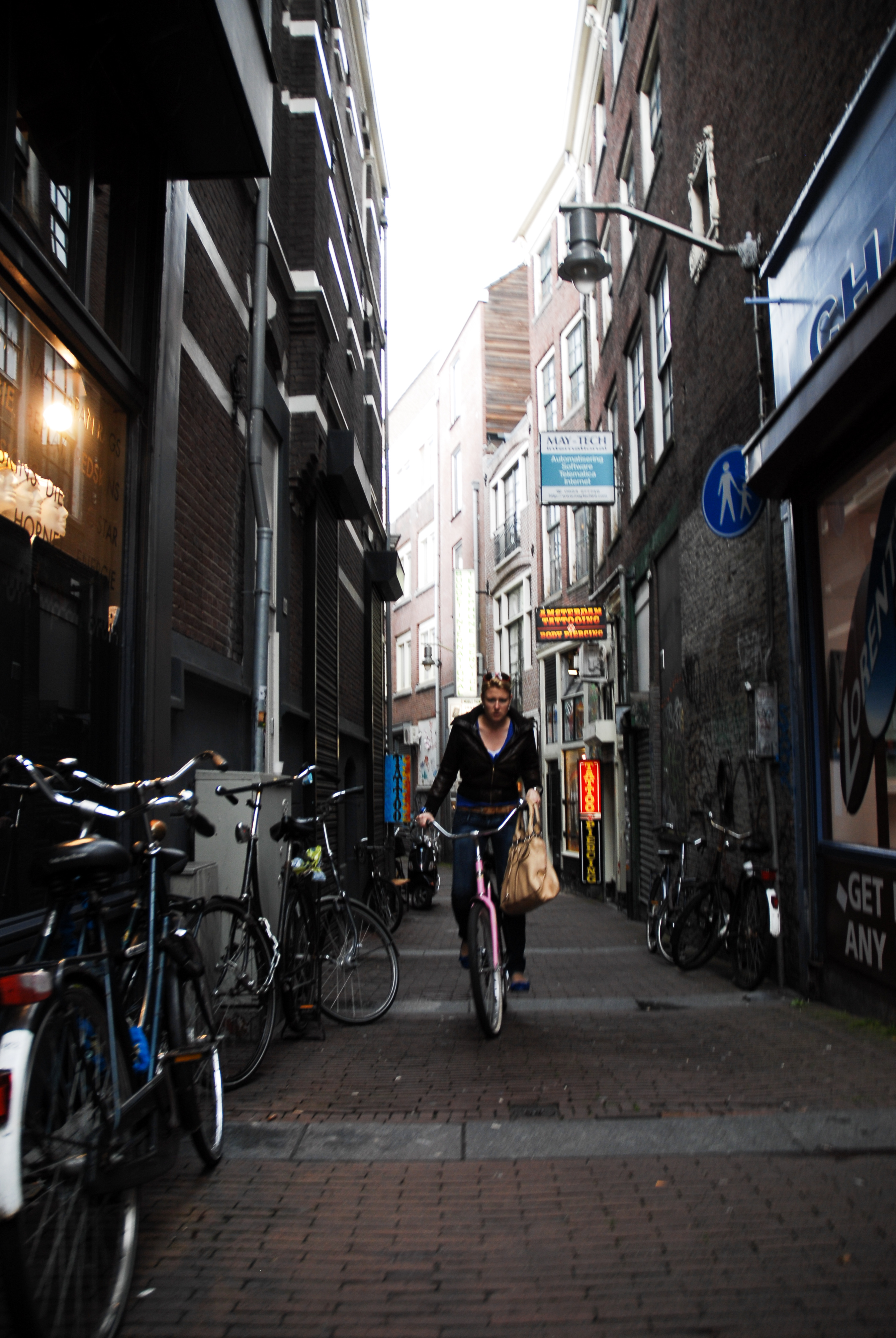 Nieuwezijds Armsteeg street. Amsterdam, Netherlands, Northern Europe.